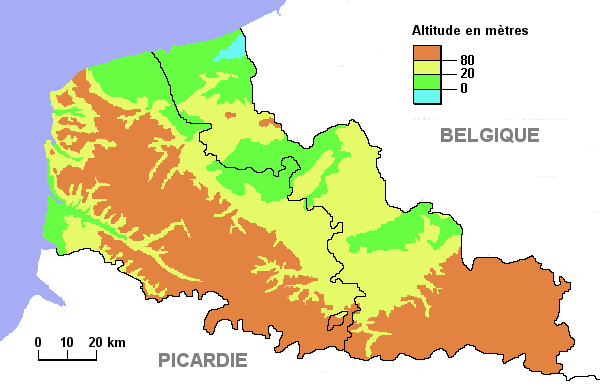 Carte schématique du relief de la région Nord-Pas de Calais basée sur le site